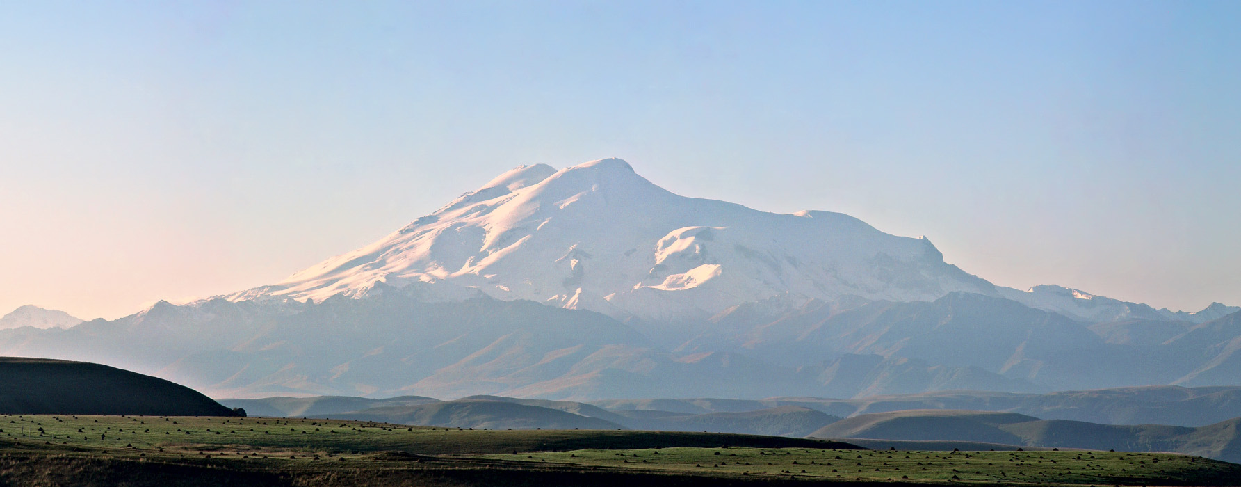 Эльбрус